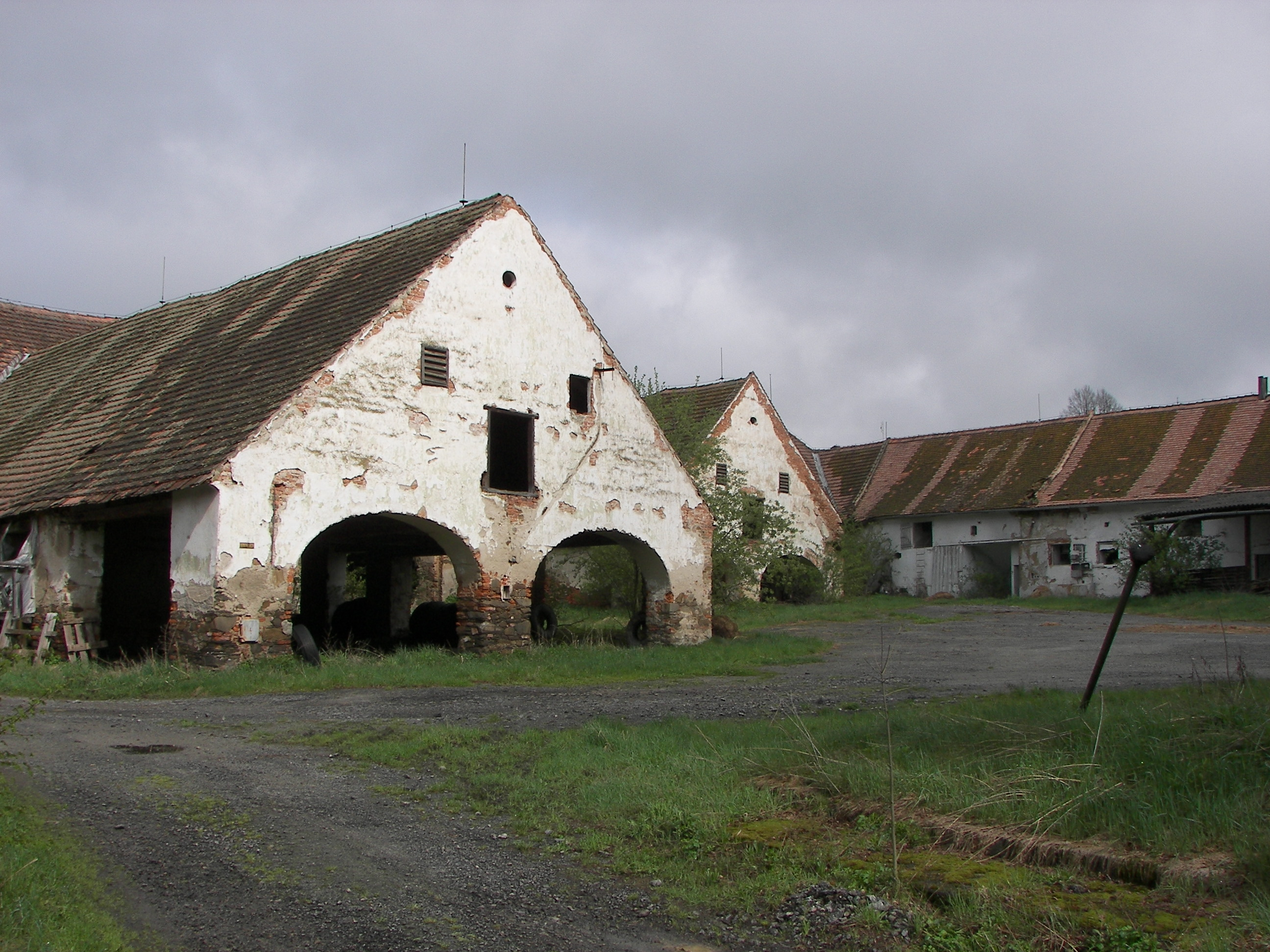 Nádvoří zámku v Komařicích